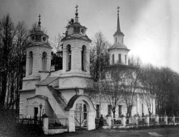 Знаменская церковь в селе Ушаково Ясногорского района